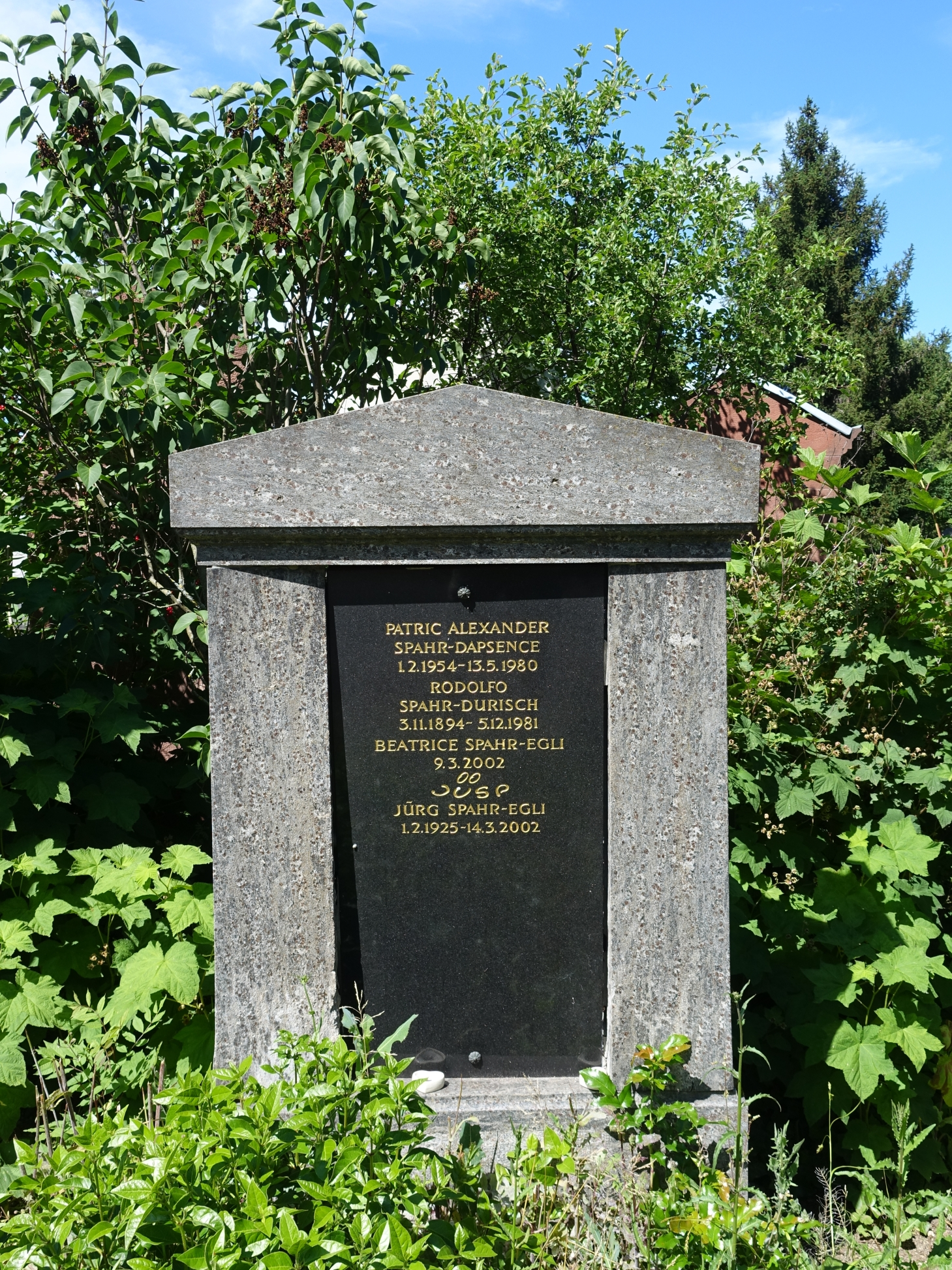 Jürg Spahr (1925–2002) Karikaturist und Kabarettist. Familien Grab. Spahr-Durisch-Egli-Dapsence auf dem Friedhof Wolfgottesacker, Basel